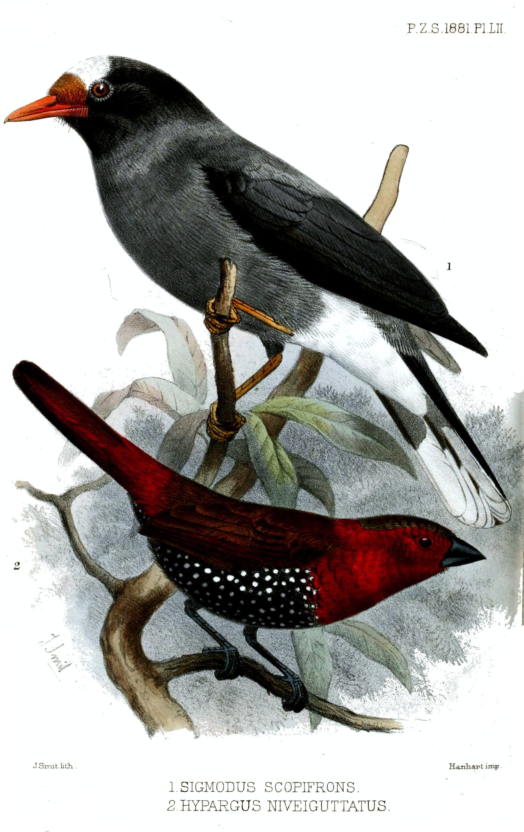 Sigmodus scopifrons & Hypargus niveiguttatus